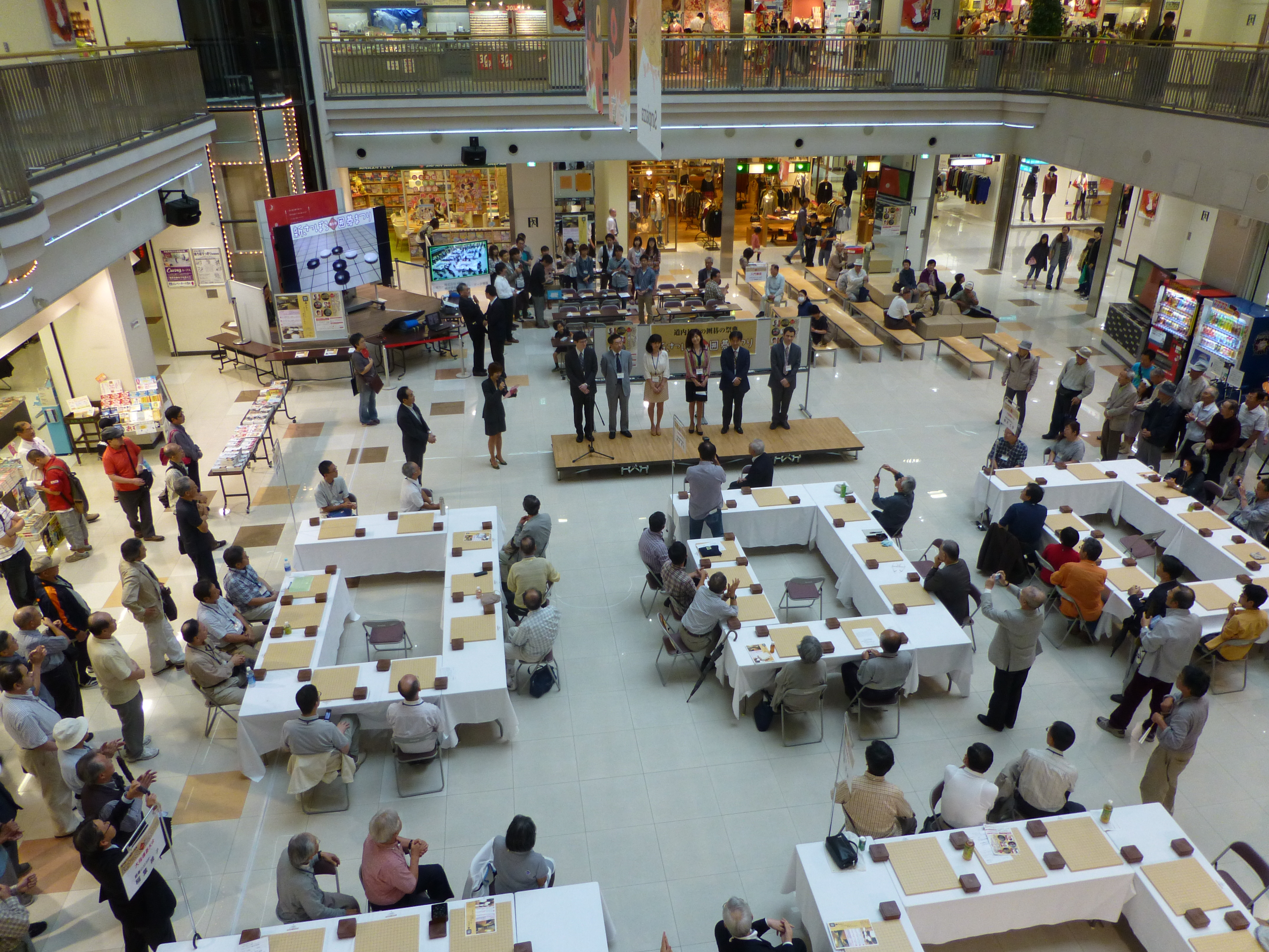 オープニング風景（第2回・2013年9月16日）